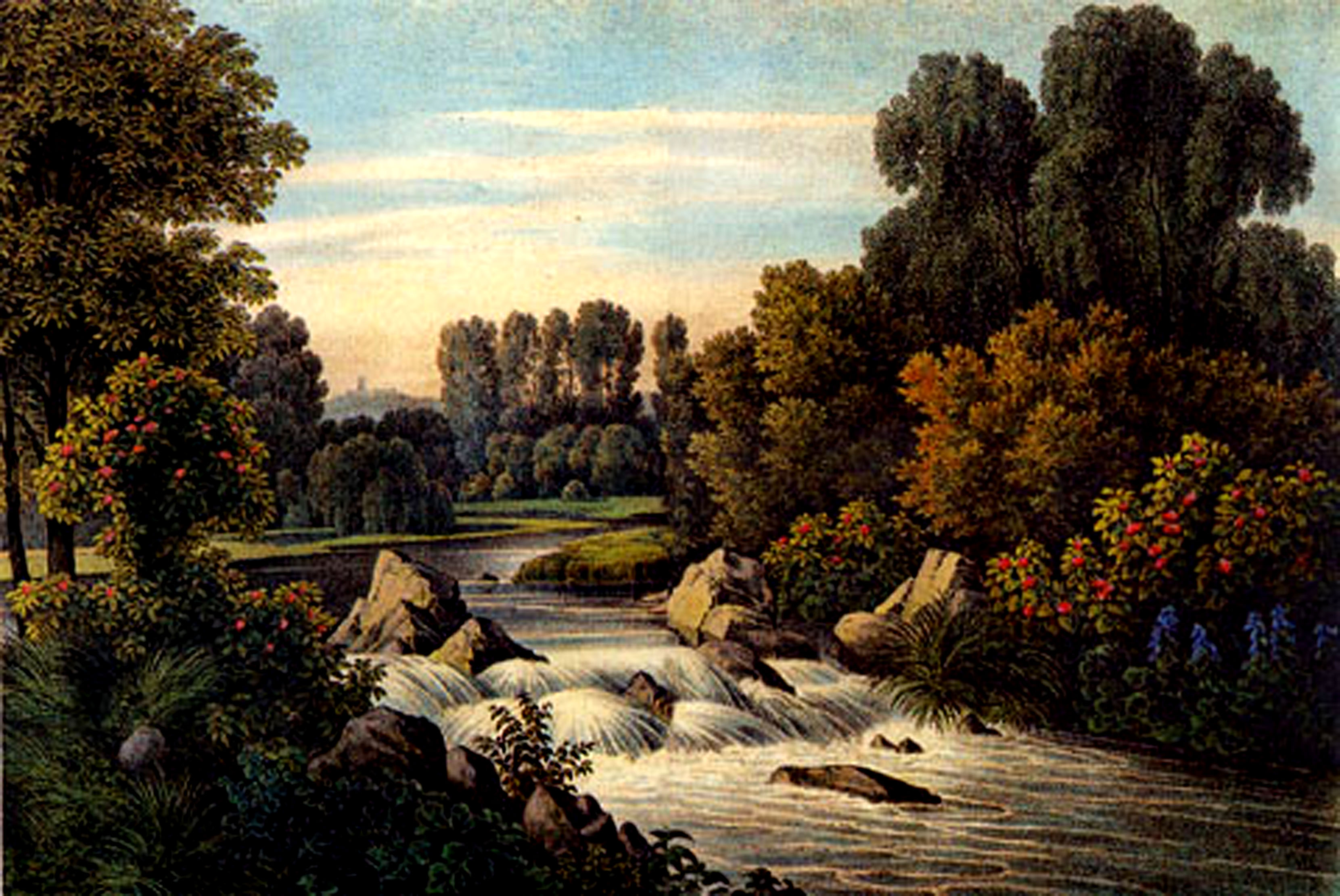 Gestaltung von Wehren im Park von Muskau, aus "Andeutungen über Landschaftsgärtnerei" des Fürsten Pückler